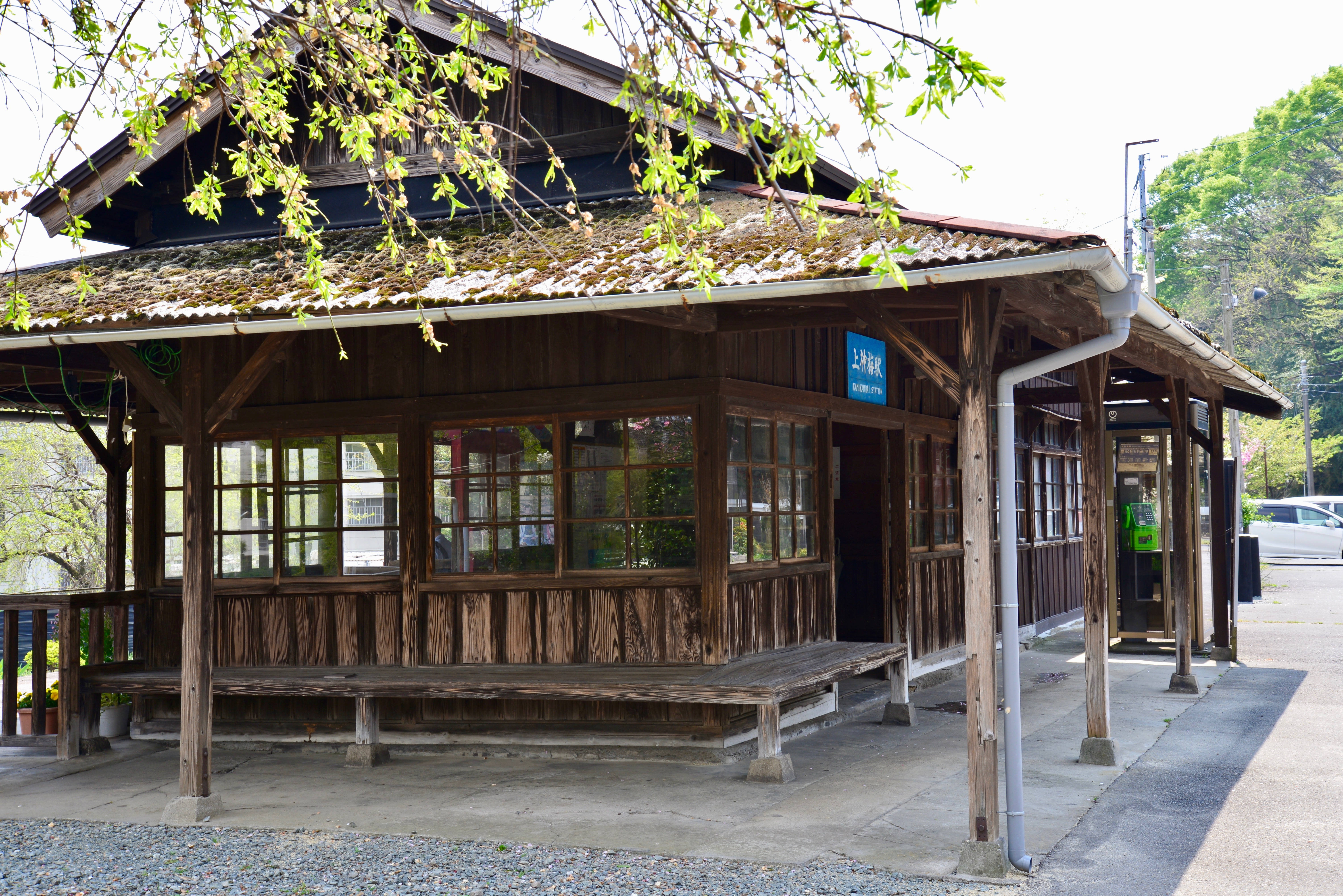 わたらせ渓谷鐵道上神梅駅